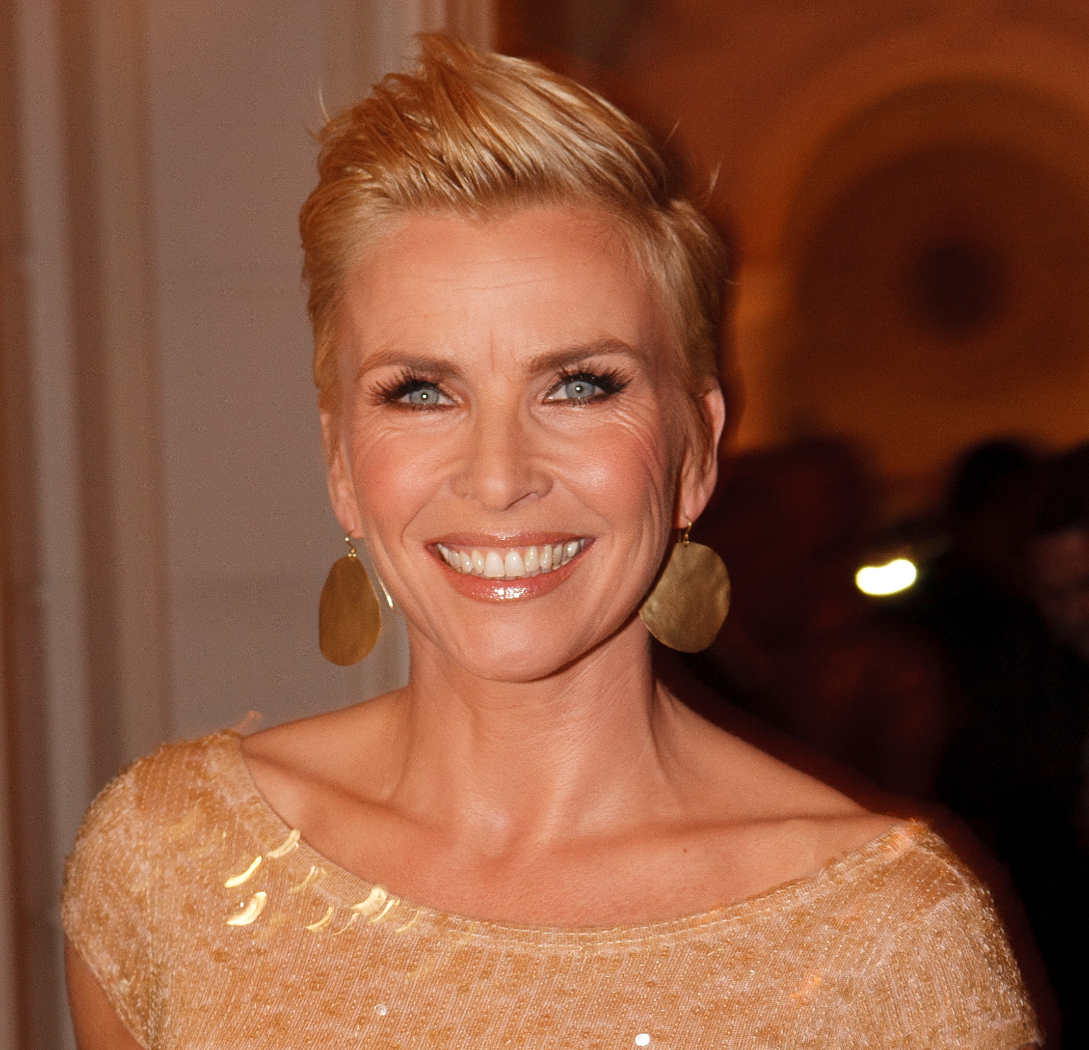 Presentatrice Anita Witzier tijdens de Beau Monde Awards 2010